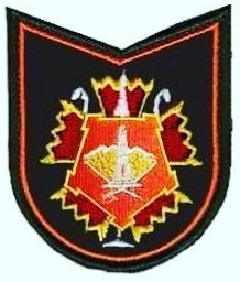 эмблема